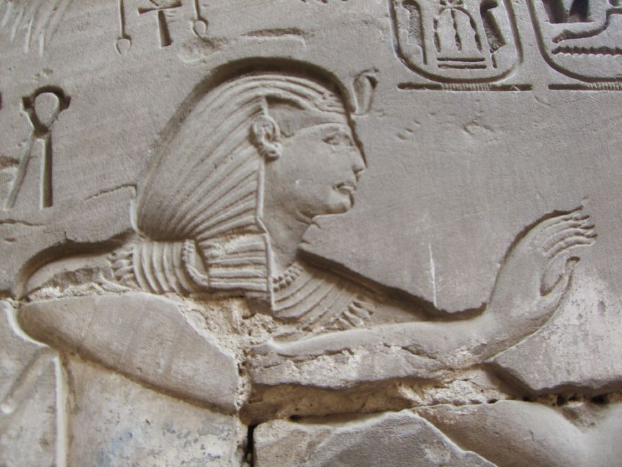 Relief représentant le pharaon Ramsès IV - Temple de Khonsou à Karnak - XXe dynastie égyptienne